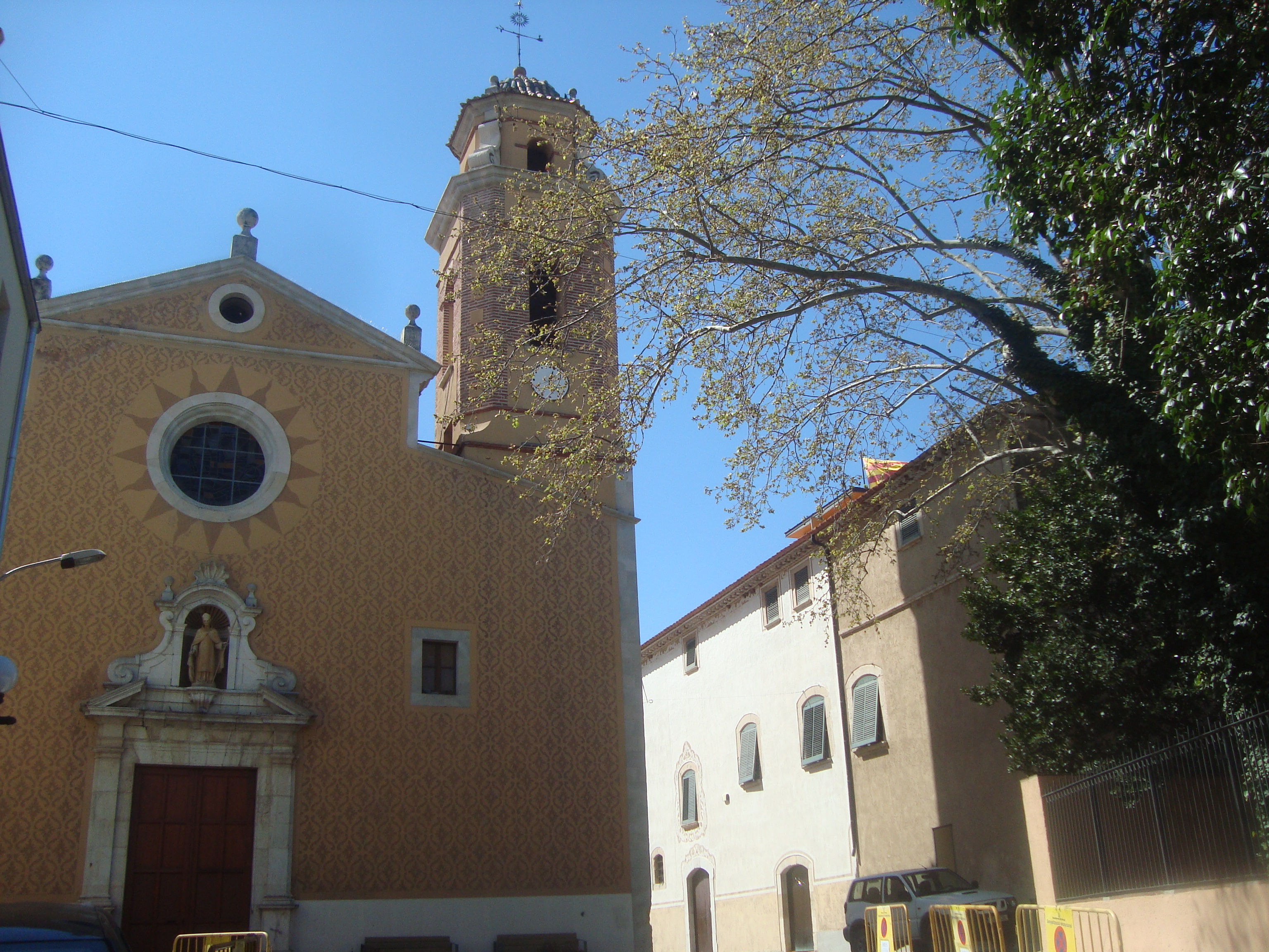 Església parroquial de Sant Martí (el Morell)